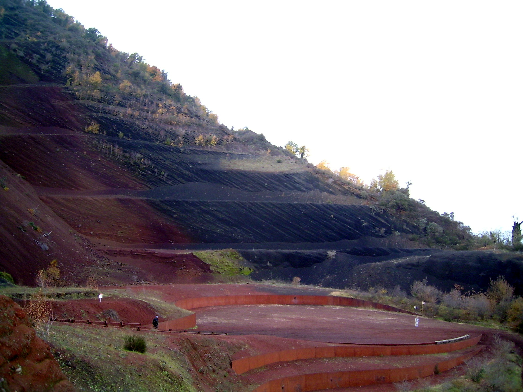 Volcà del Croscat, Santa Pau, la Garrotxa, Catalunya. Reserva Natural del Croscat.